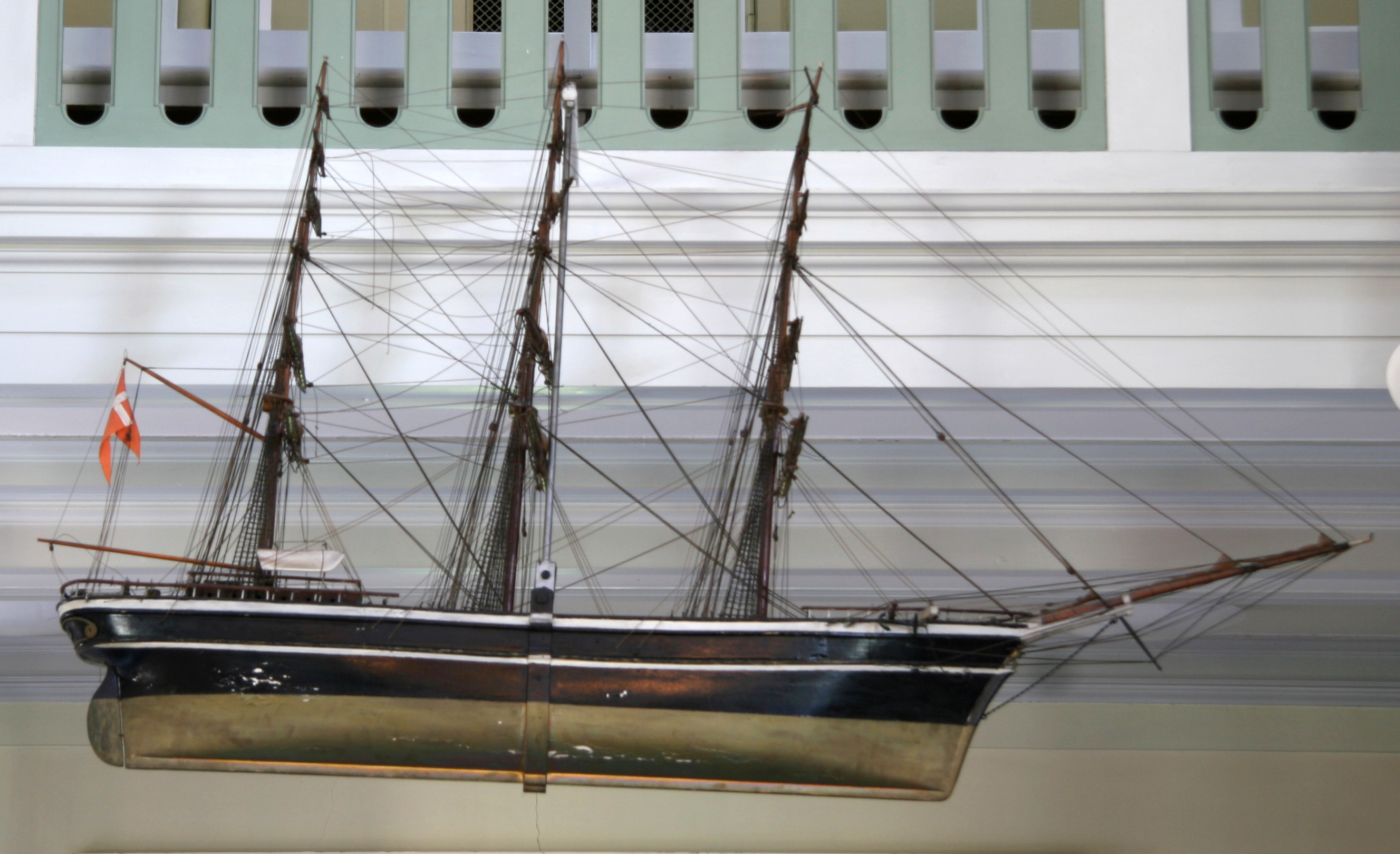 De Gamles Bys Kirke in Copenhagen, Denmark. Church ship.